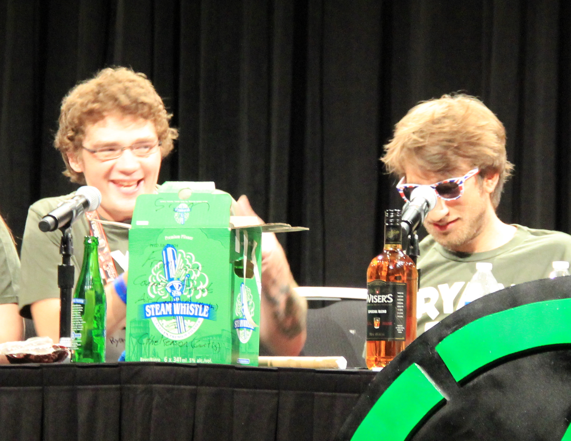 IMG_1962 Taken at RTX 2014.